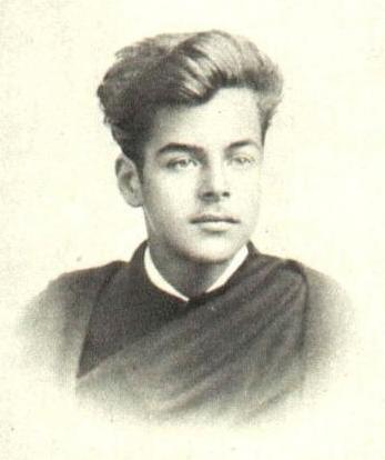 Détail d'une photo d'Afonso Lopes Vieira, alors qu'il était étudiant en droit à Coimbra en 1894.